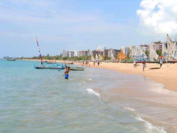 Maceio, BrasileJangadas na orla